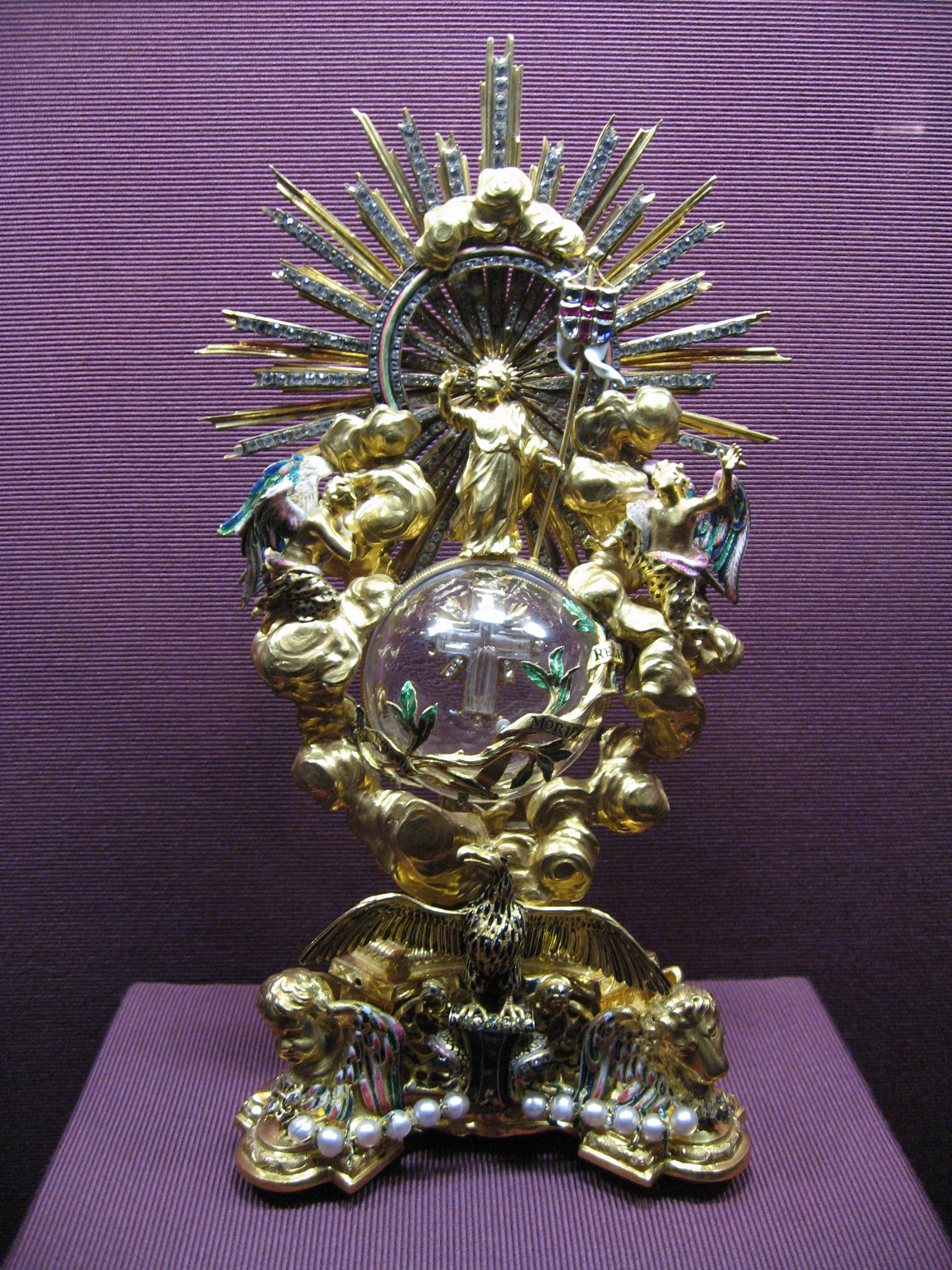 Pacificale: Christus als Weltenrichter. Johann Baptist Känischbauer von Hohenried (1668-1739). Wien, 1726. Gold, teilweise emailliert, Bergkristall, Glassteine. Inv. Nr. D 39. The Ecclesiastical Treasury (Geistliche Schatzkammer) in the Hofburg in Vienna.